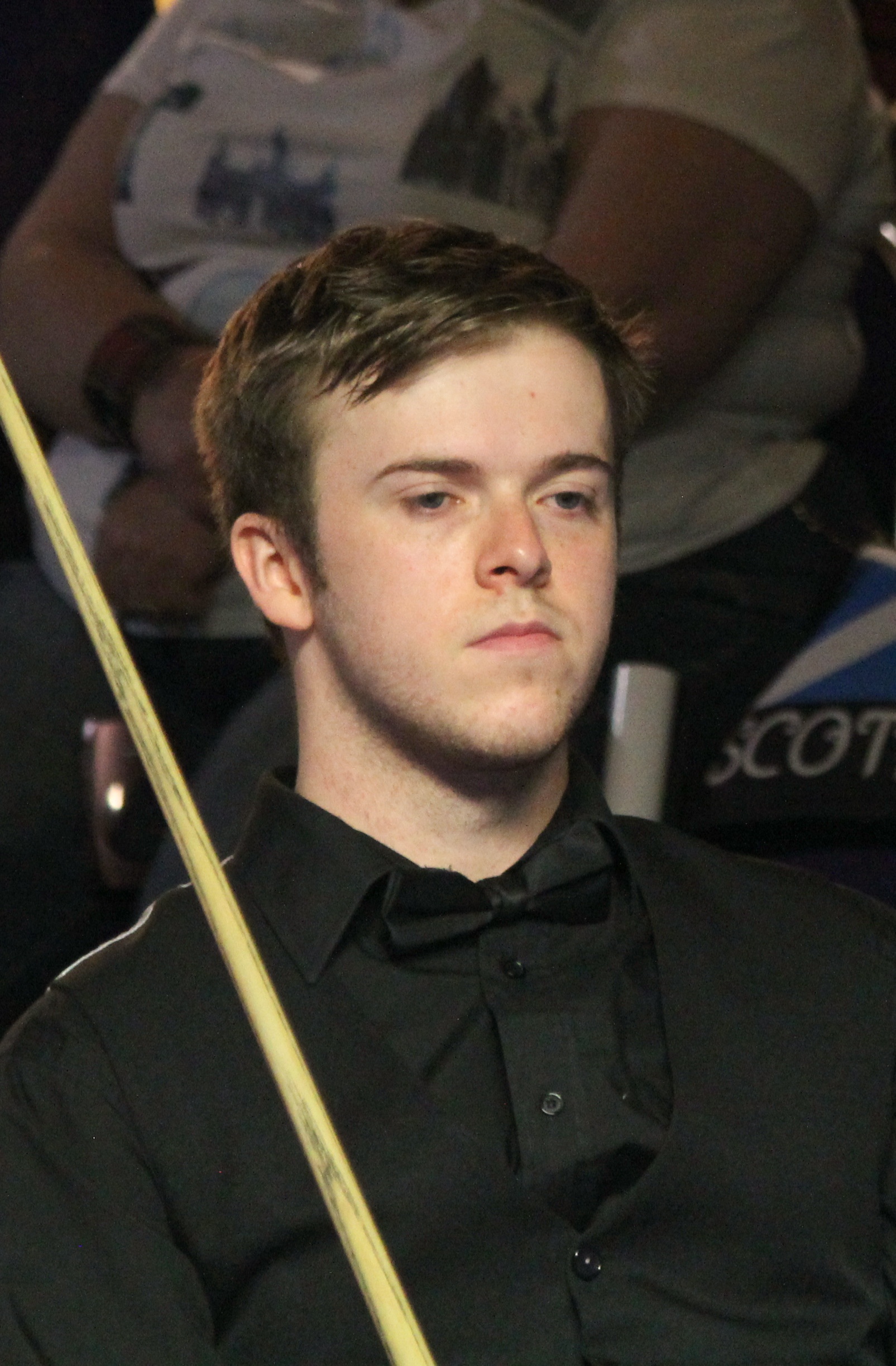 Josh Boileau beim Paul Hunter Classic 2016